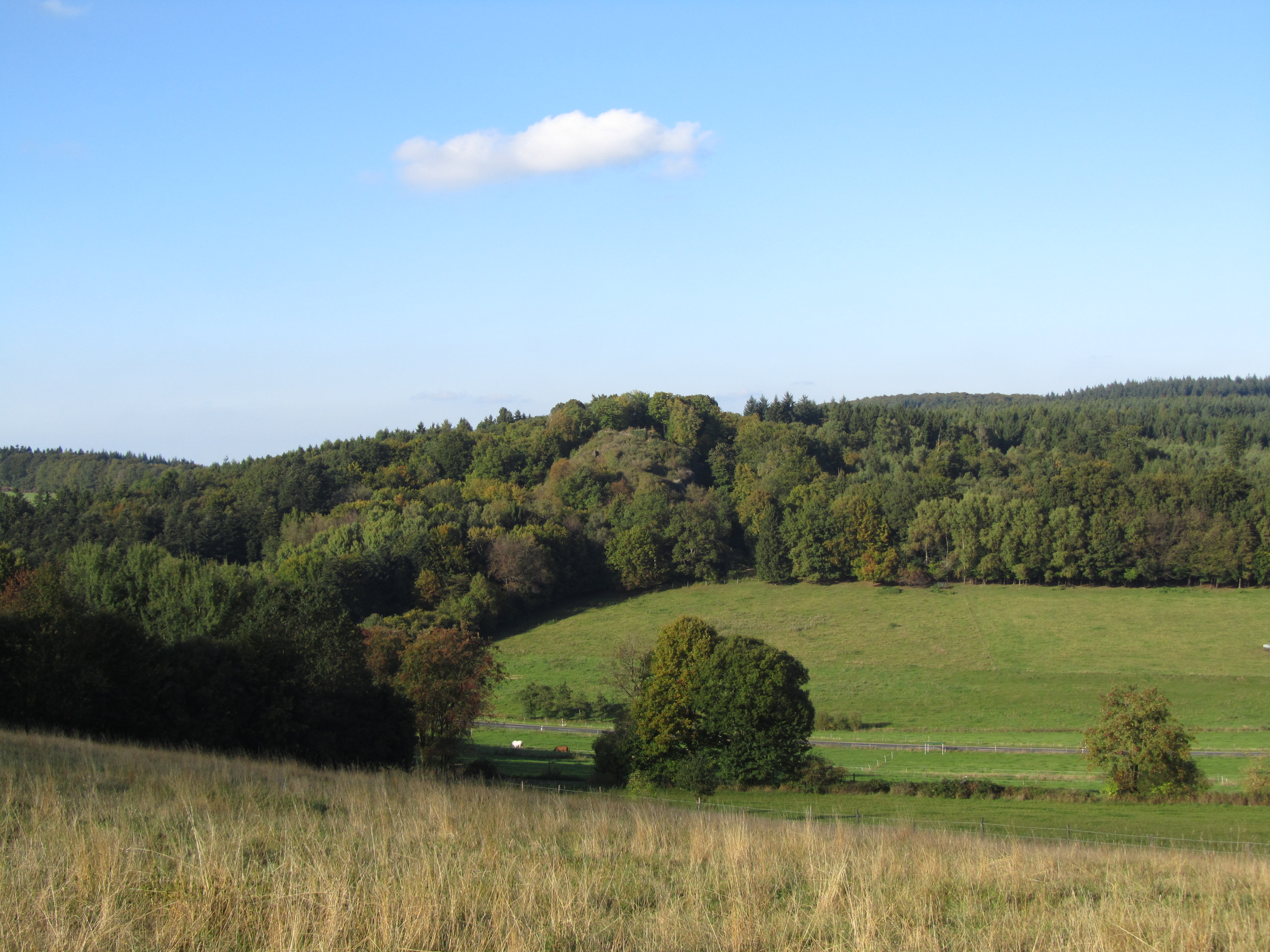 Gesamtansicht des Beilsteins im Spessart von Südwesten.